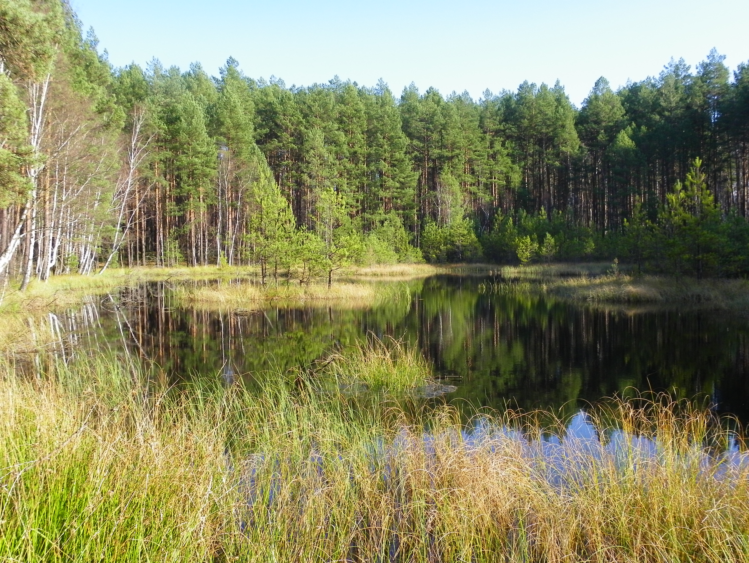 Старочуднівський, Романівський р-н, ДП «Баранівське ЛМГ», Биківське лісництво, кв. 75, вид.7